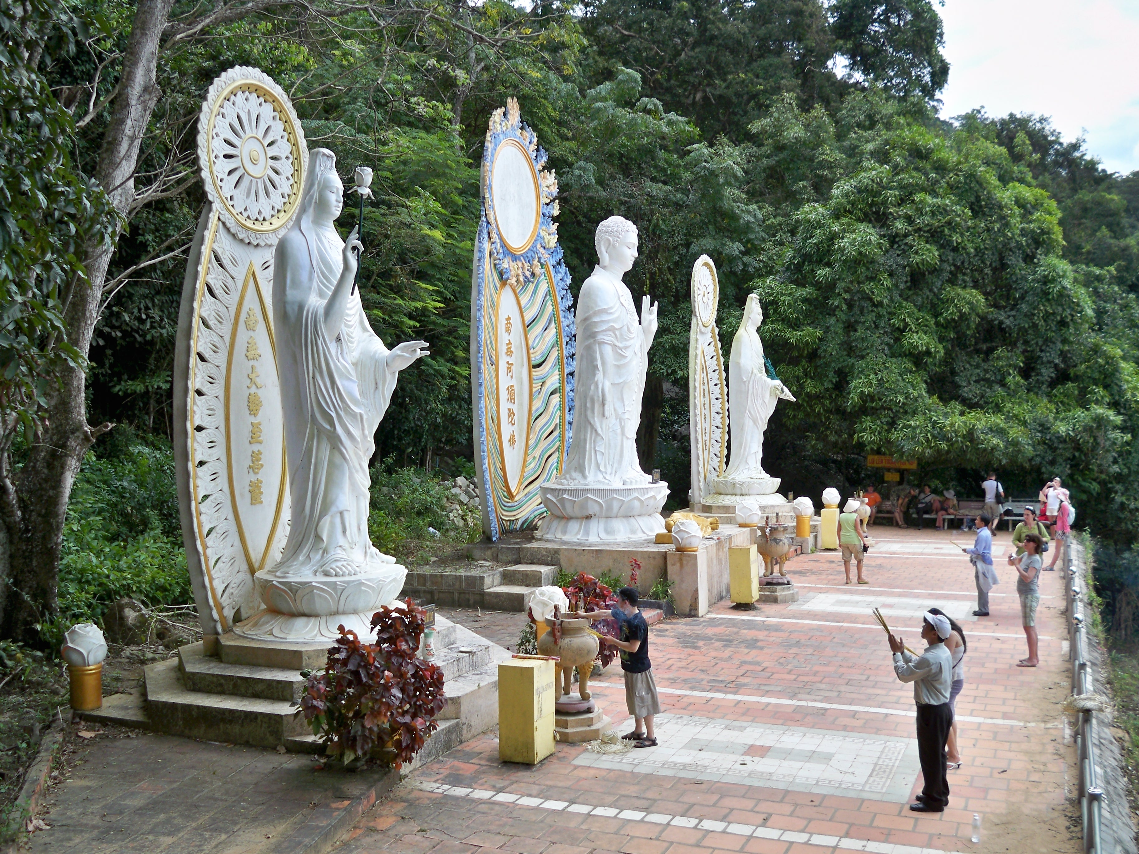 Di đà tam Tôn trên chùa núi Tà Cú do Liftold chụp